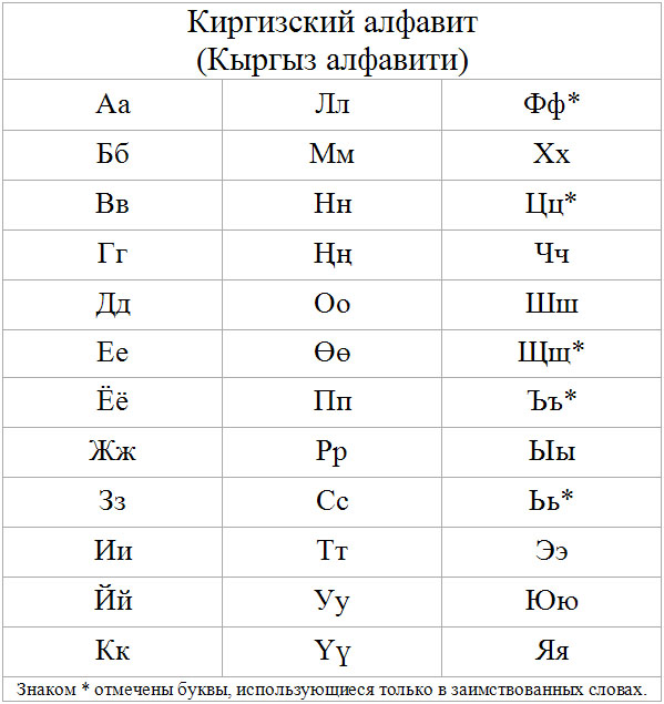 киргизский алфавит